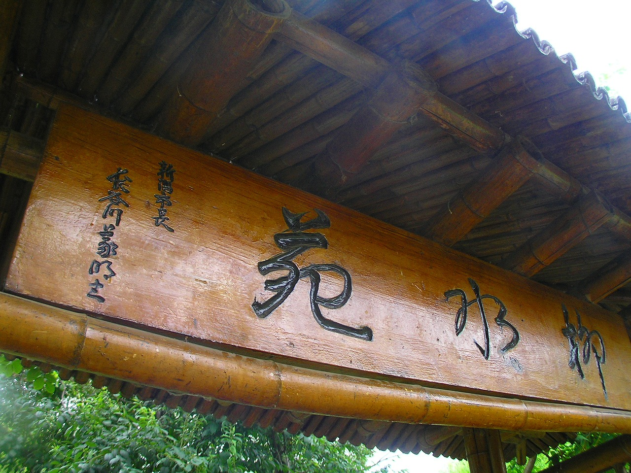 新潟友好園 ハルビンと新潟市の友好都市関係の締結10周年を記念する目的で建てら、1989年9月1日に落成し公開されている。園の面積は約4.2万㎡、典型的な日本の回遊式庭園であり日本の花や木が植樹されている。 園中には日本式建築の日中友好的記念館があり、館内には水屋、茶室、和室、床の間などがある。その他、日本の有名な景観を模した、太鼓橋（白山公園の橋を模して造られた）、ヒョウタン池（日本海を象徴する）、万代橋（新潟市のシンボル）や人工の渓流、築山、日本式東屋、手水鉢、井戸、石灯篭なども見られる。また園中の芝生の中には日中友好の記念碑が建っている。